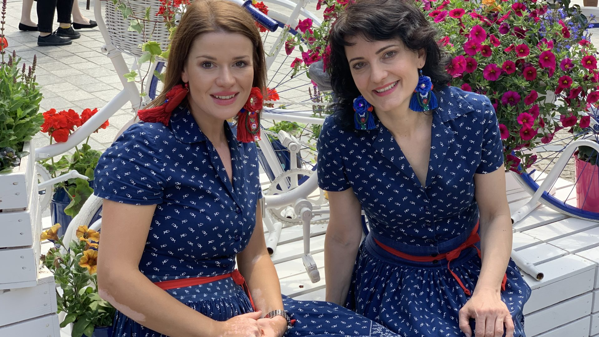 DRUŽINA - Neofolklór 2019